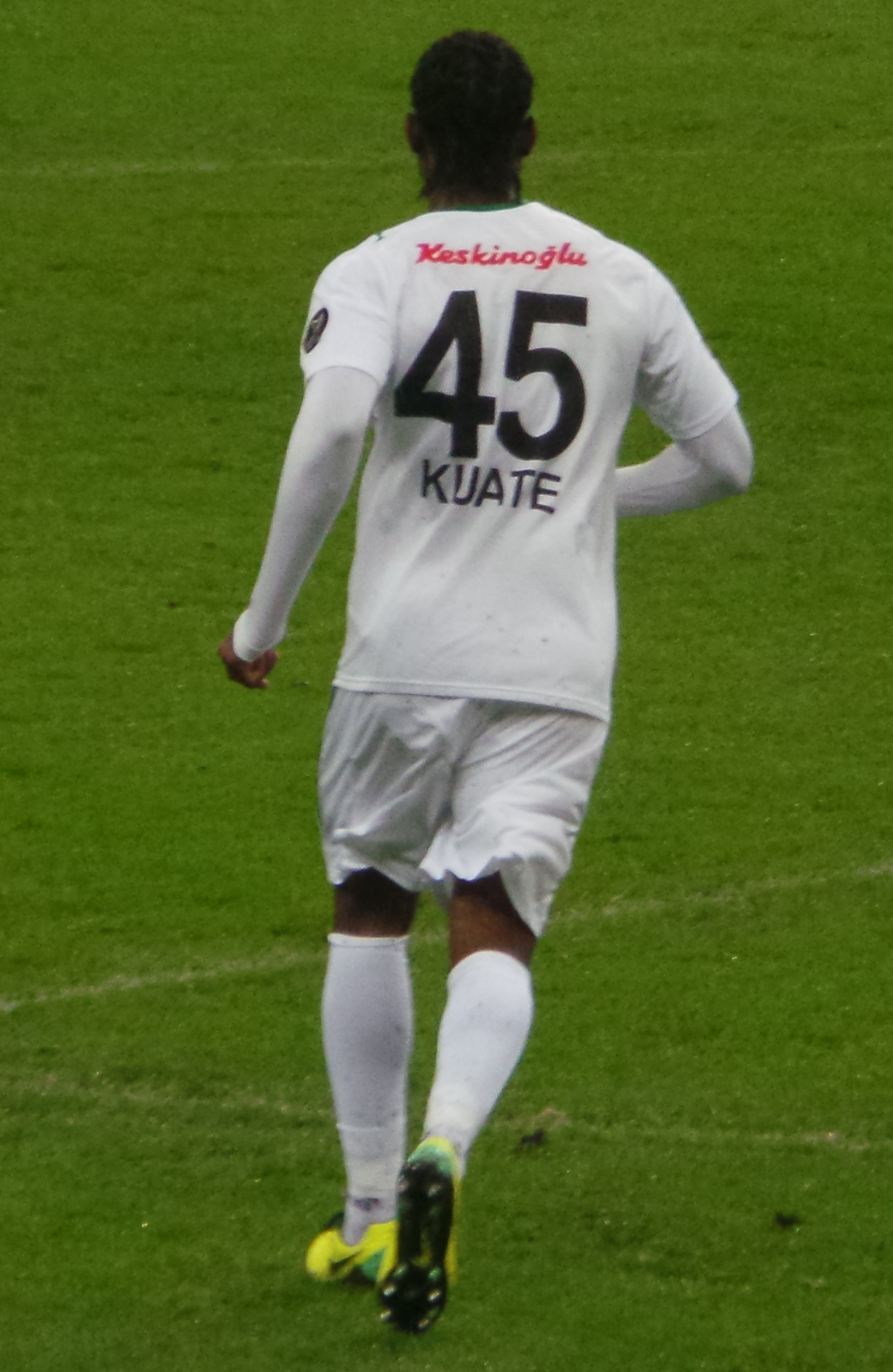 Wato Kuaté 45 numaralı forması ile